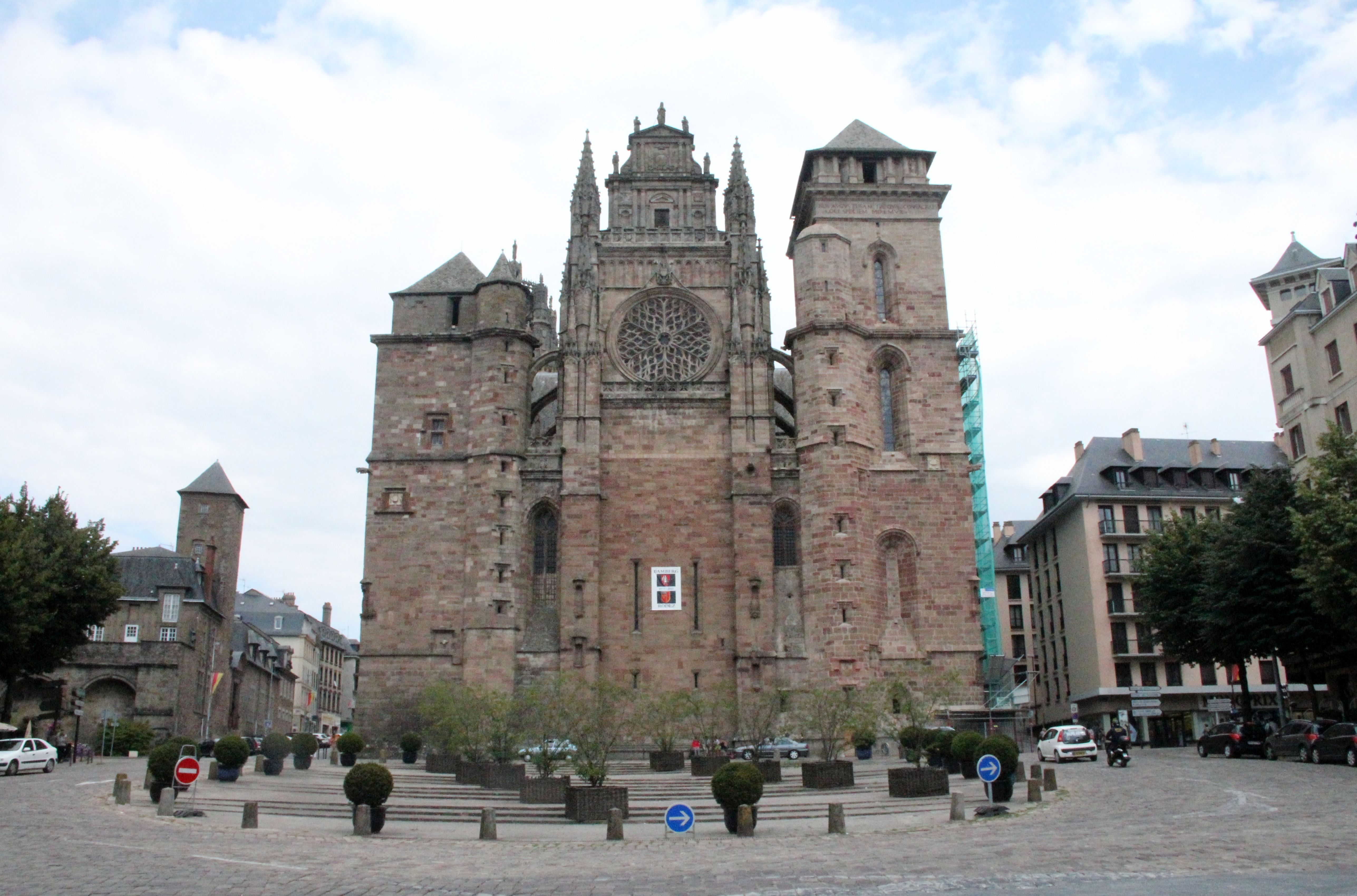 impressant la cathédrale